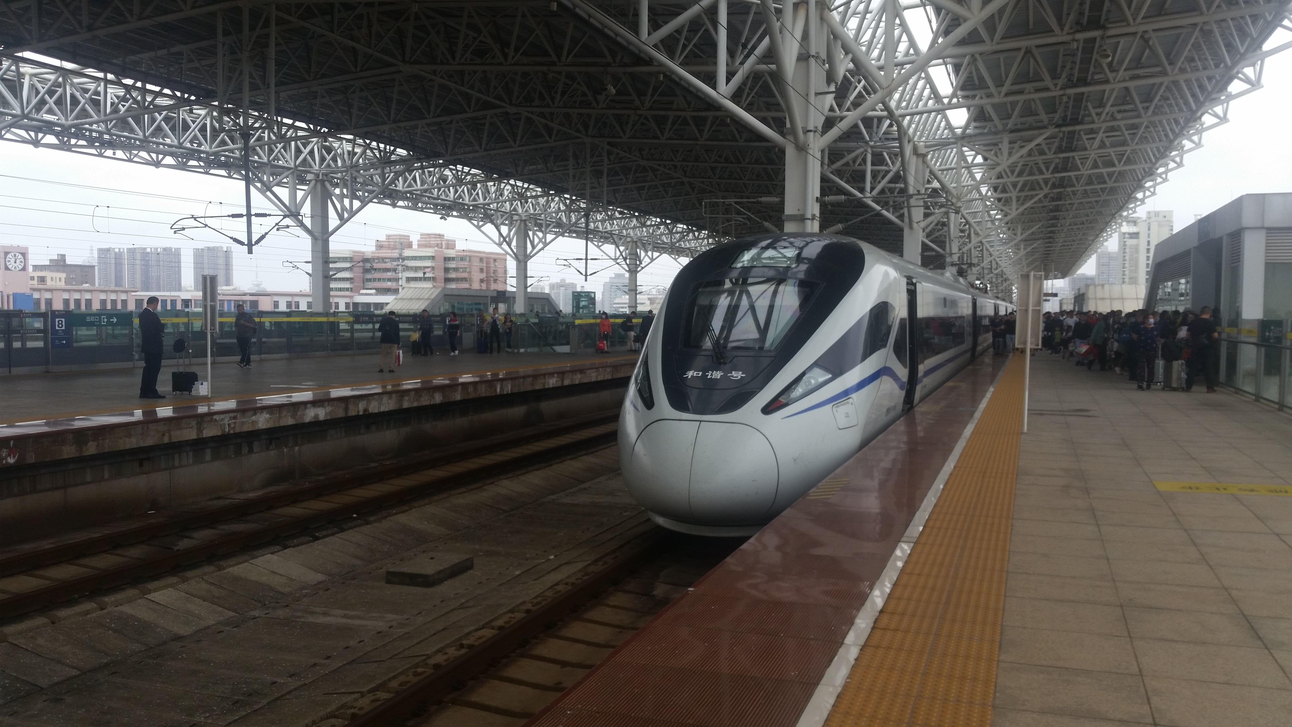 一列运营于海南东环铁路的CRH1A-A正停靠在海口东站1站台